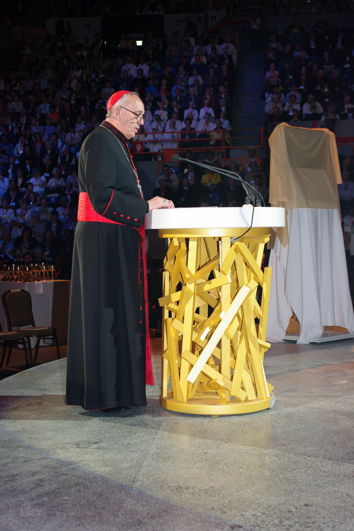 Le cardinal Bergoglio lors de sa cathéchèse au Colisée Pepsi.